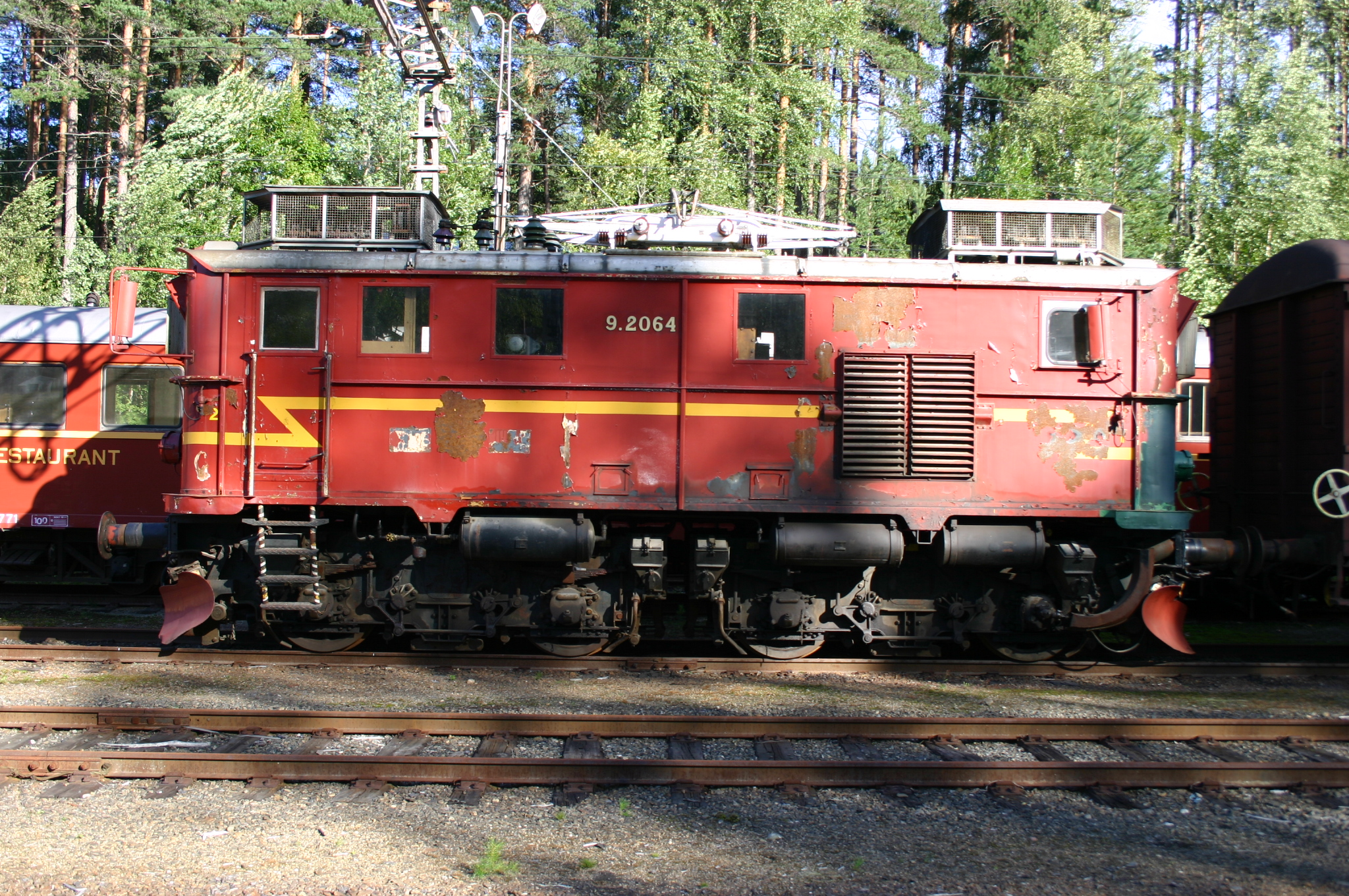 El-Lok El 9.2064 Tinnoset 16.08.05